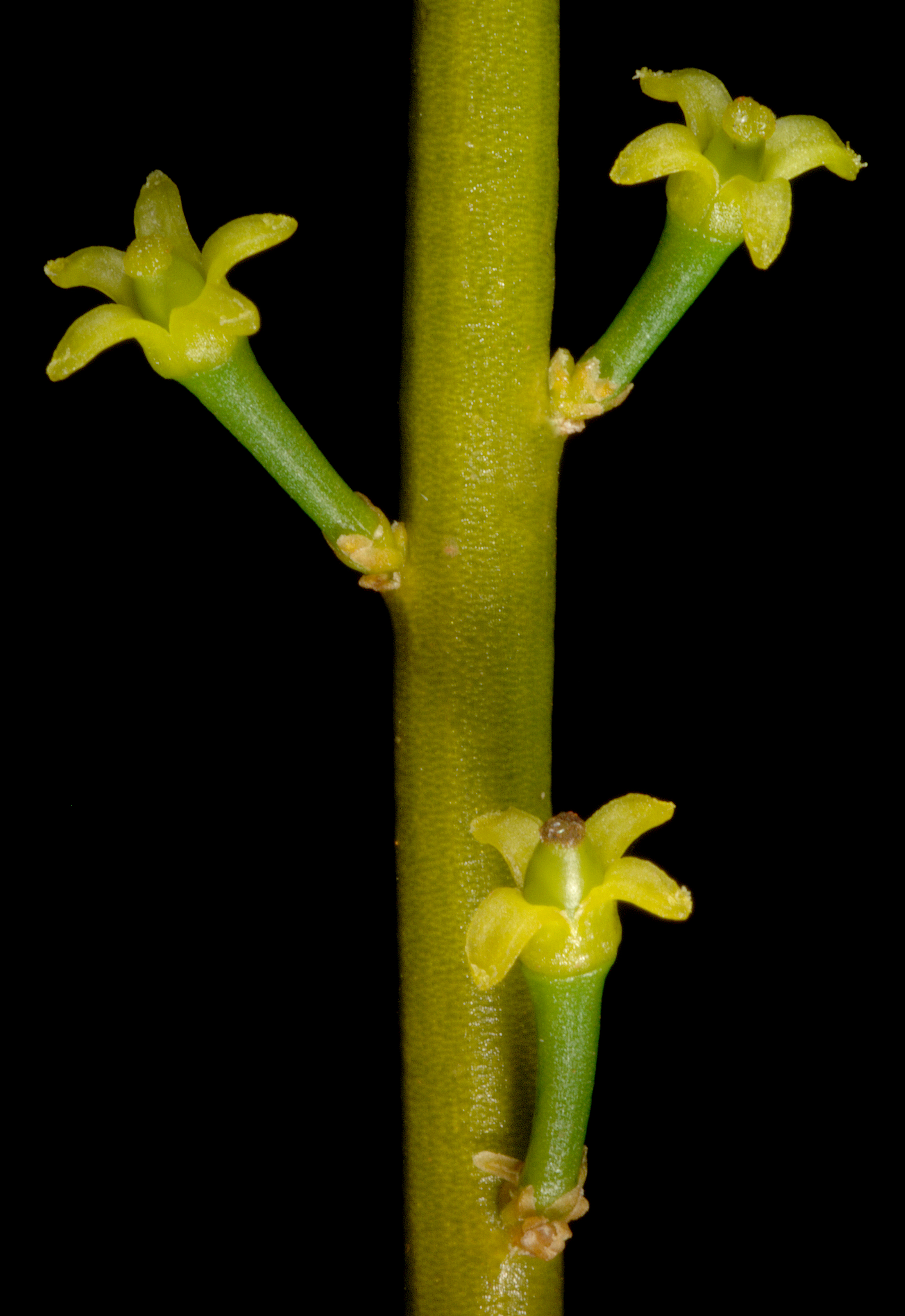 KRT3595